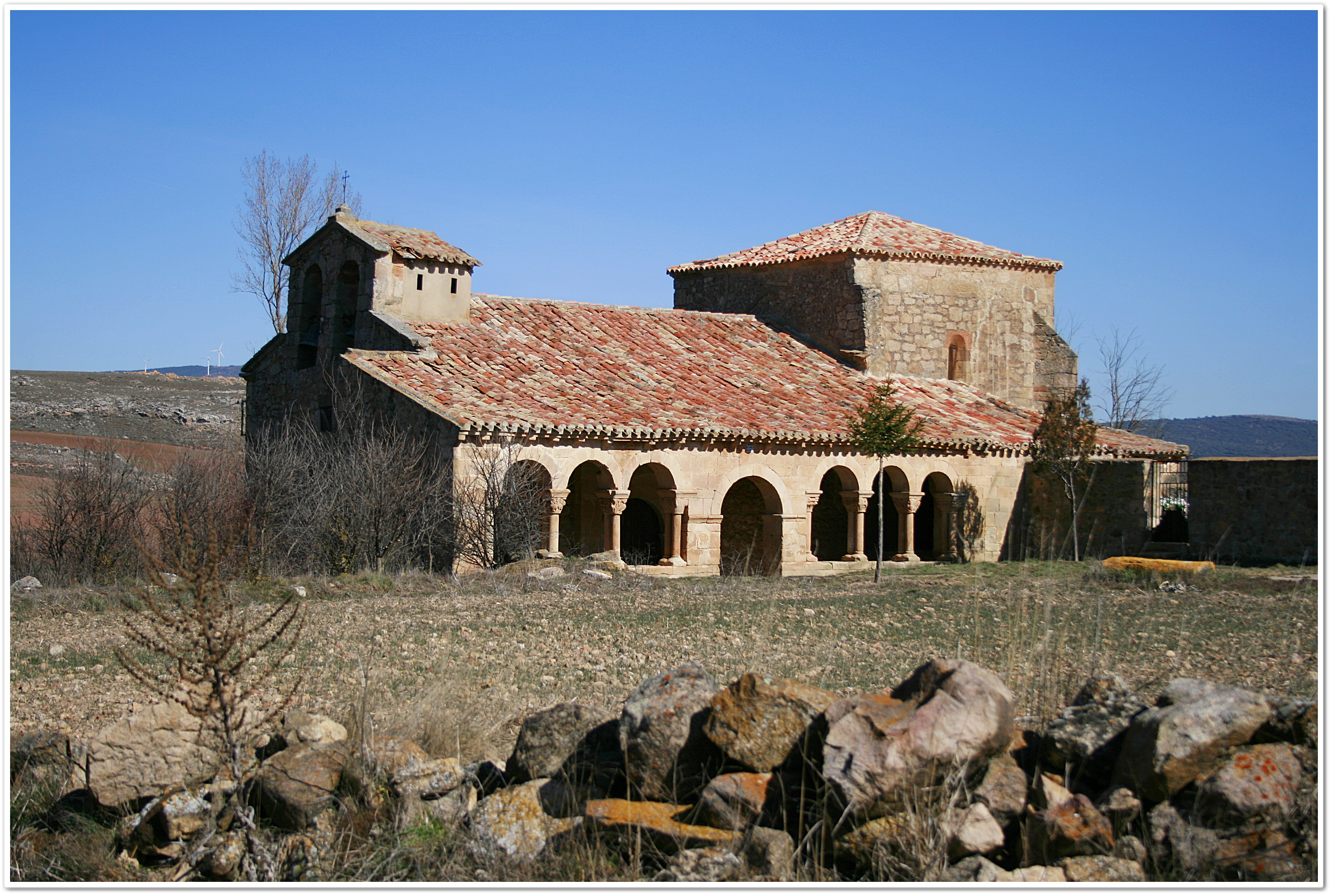 Iglesia parr. de la Concepción. Cuenta la leyenda que los huecos de esta galería, fueron abiertos por los siete infantes de Lara al entrar apresuradamente en la iglesia. Los arcos se apoyan en ocho capiteles dobles, la mitad de los cuales tienen decoración vegetal y la otra mitad contiene representaciones como una sirena-pez, arpías, dos escenas de Sansón desquijando al león, un guerrero luchando contra un monstruo y personaje clavando la lanza a un león. Los capiteles descanzan sobre dobles columnas.